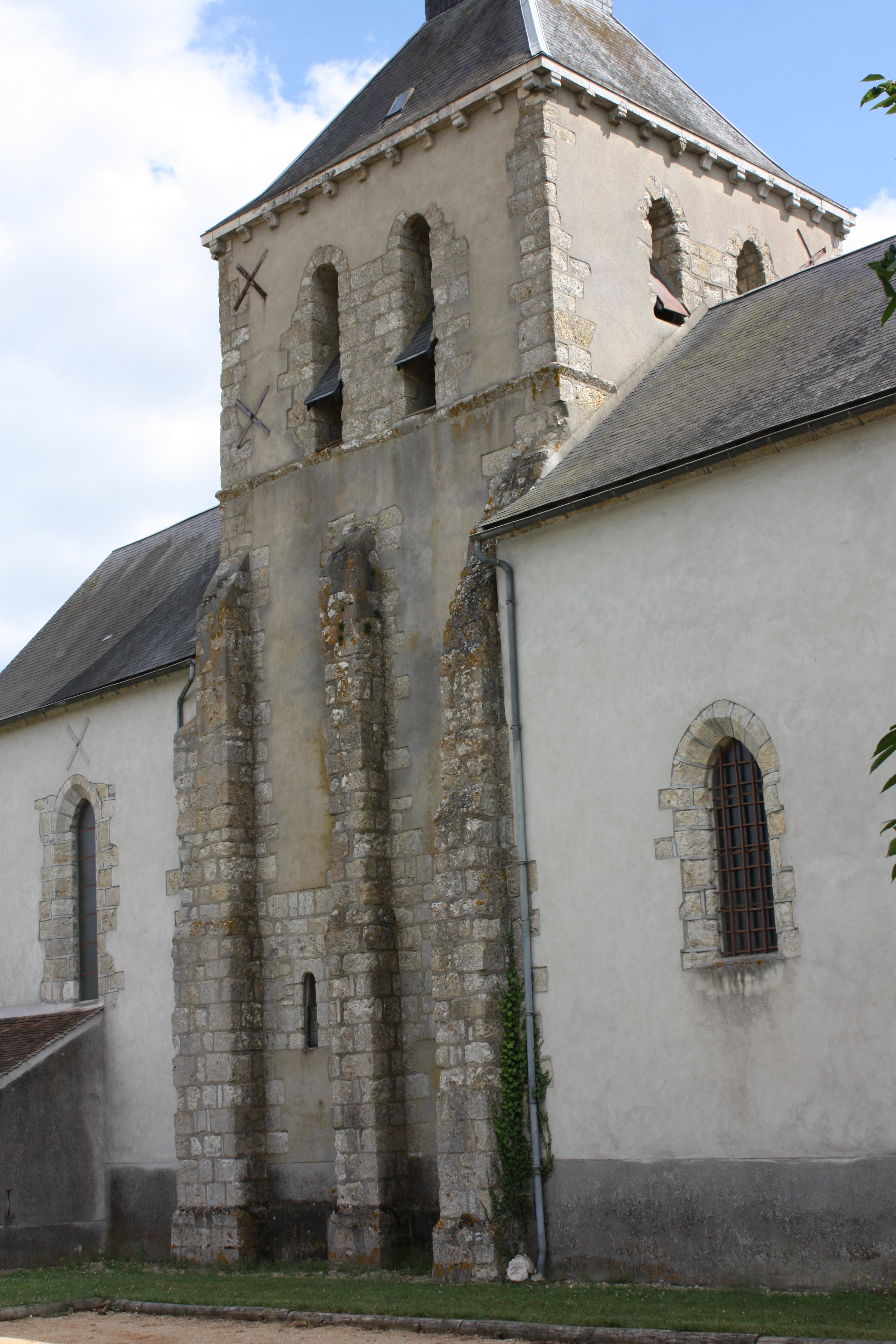 Mézières-en-Gâtinais - Eglise Saint-Benoît et Saint-Blaise. Clocher vu du Nord-Ouest.